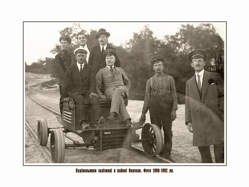 Строители железной дороги, которая и положила существование поселку